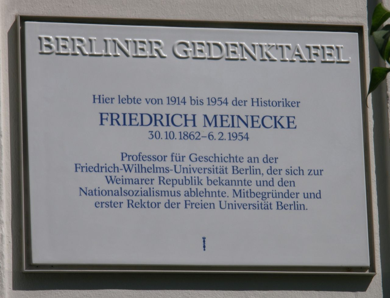 Berliner Gedenktafel für Friedrich Meinecke. Am Hirschsprung 13, Berlin-Dahlem